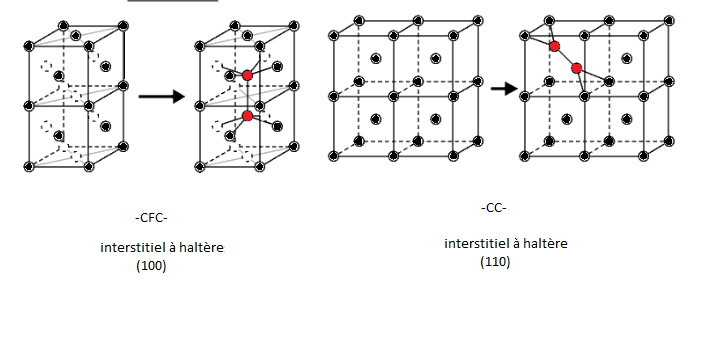 interstitiel à haltère (100) et (110)